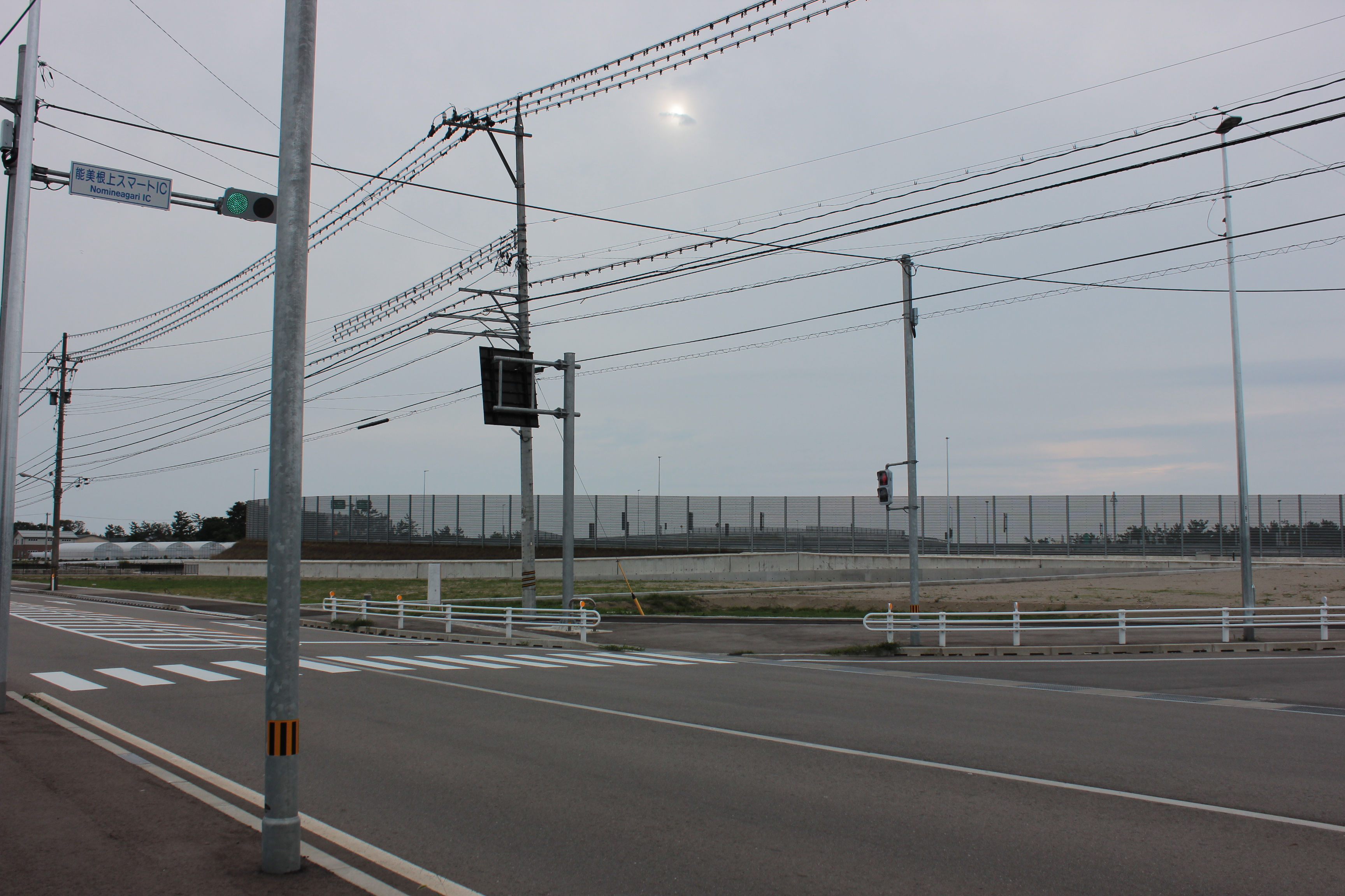 能美根上スマートインターチェンジ（石川県能美市） Canon EOS Kiss X5